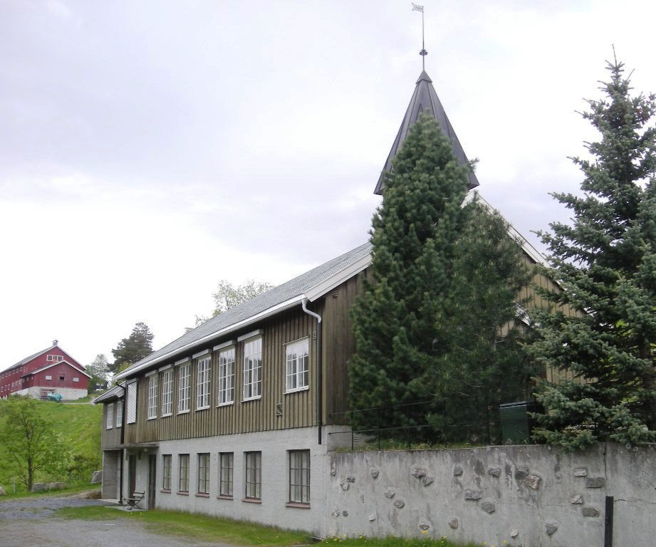 Reinli kapell, også kalt Reinli nye kirke